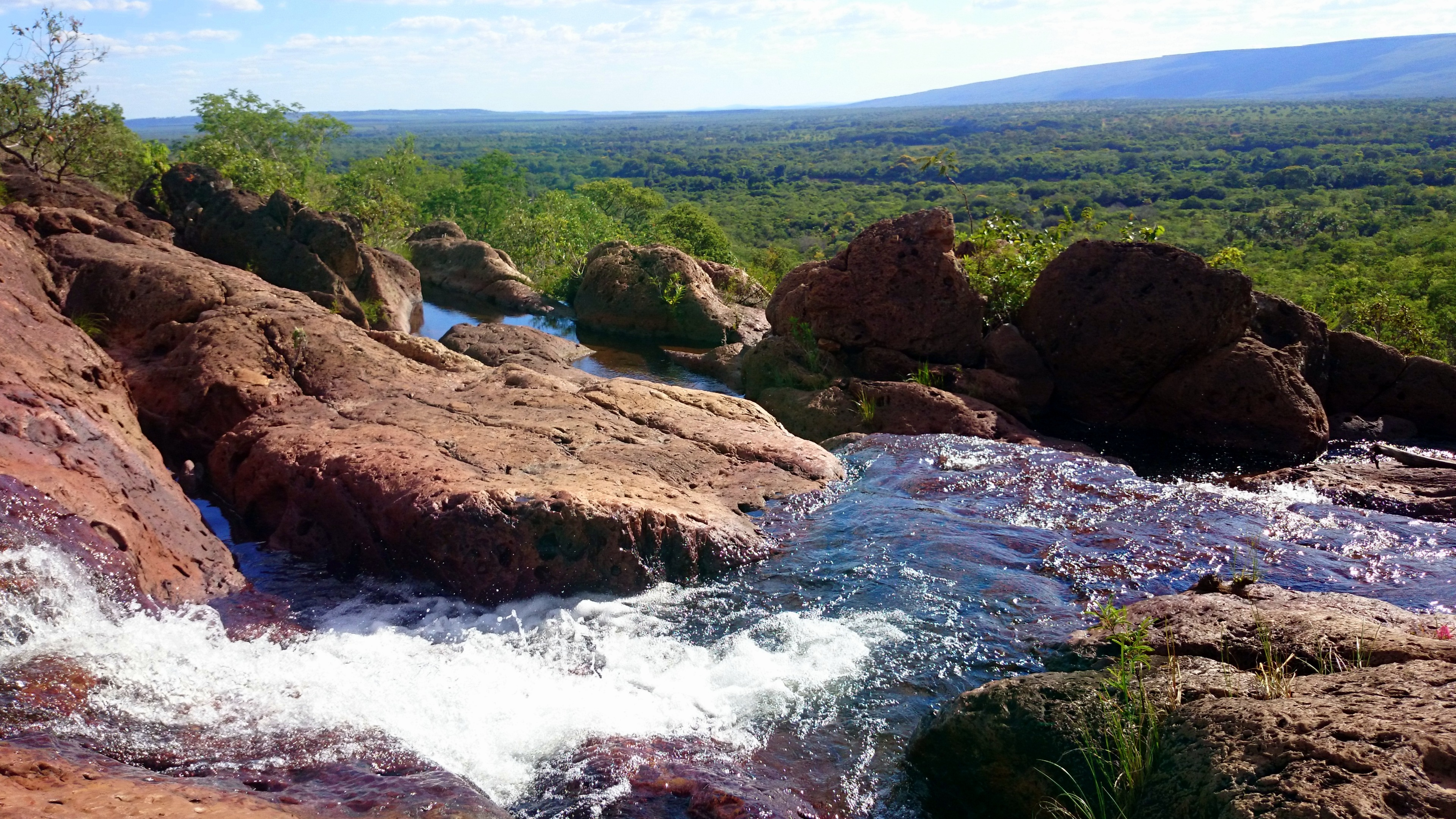 Cachoeira dos porcos, parte alta. Fotografia capturada em Lassance - MG